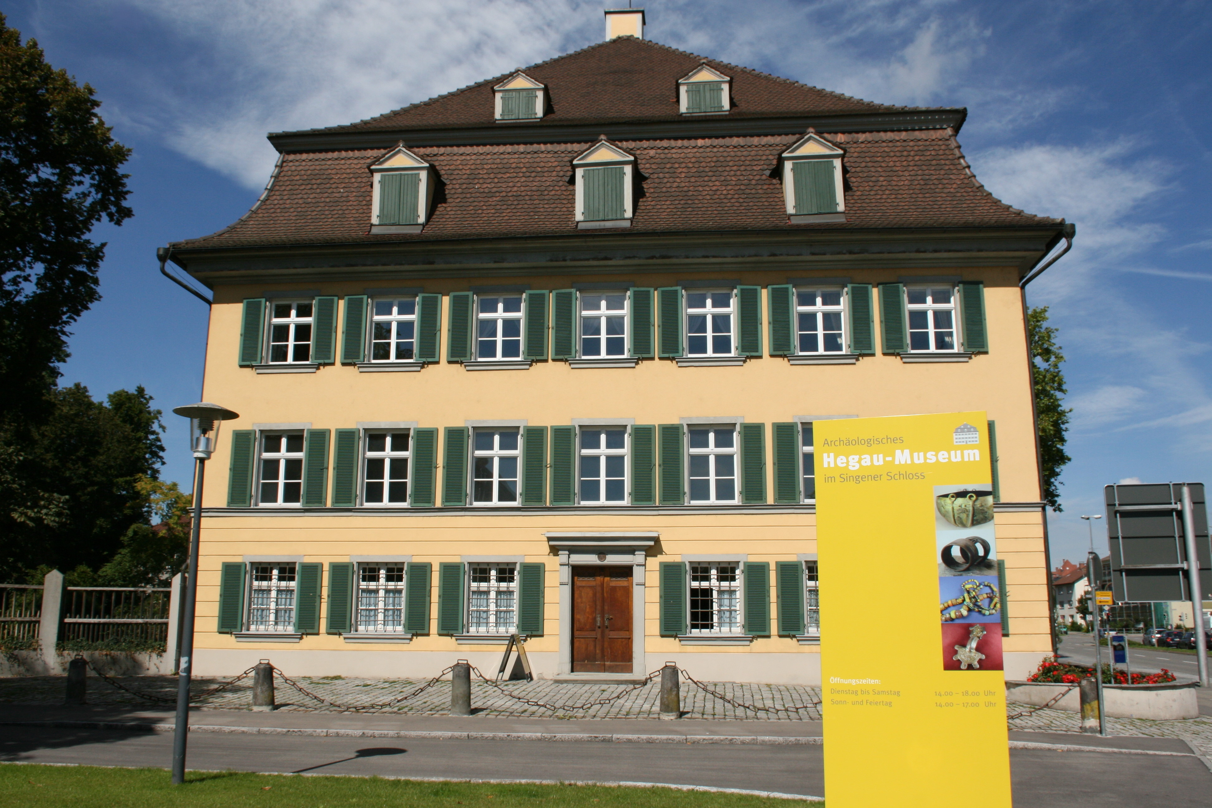 Archäologisches Hegau-Museum im Oberen Schloss, Am Schlossgarten 2 in Singen (Hohentwiel)